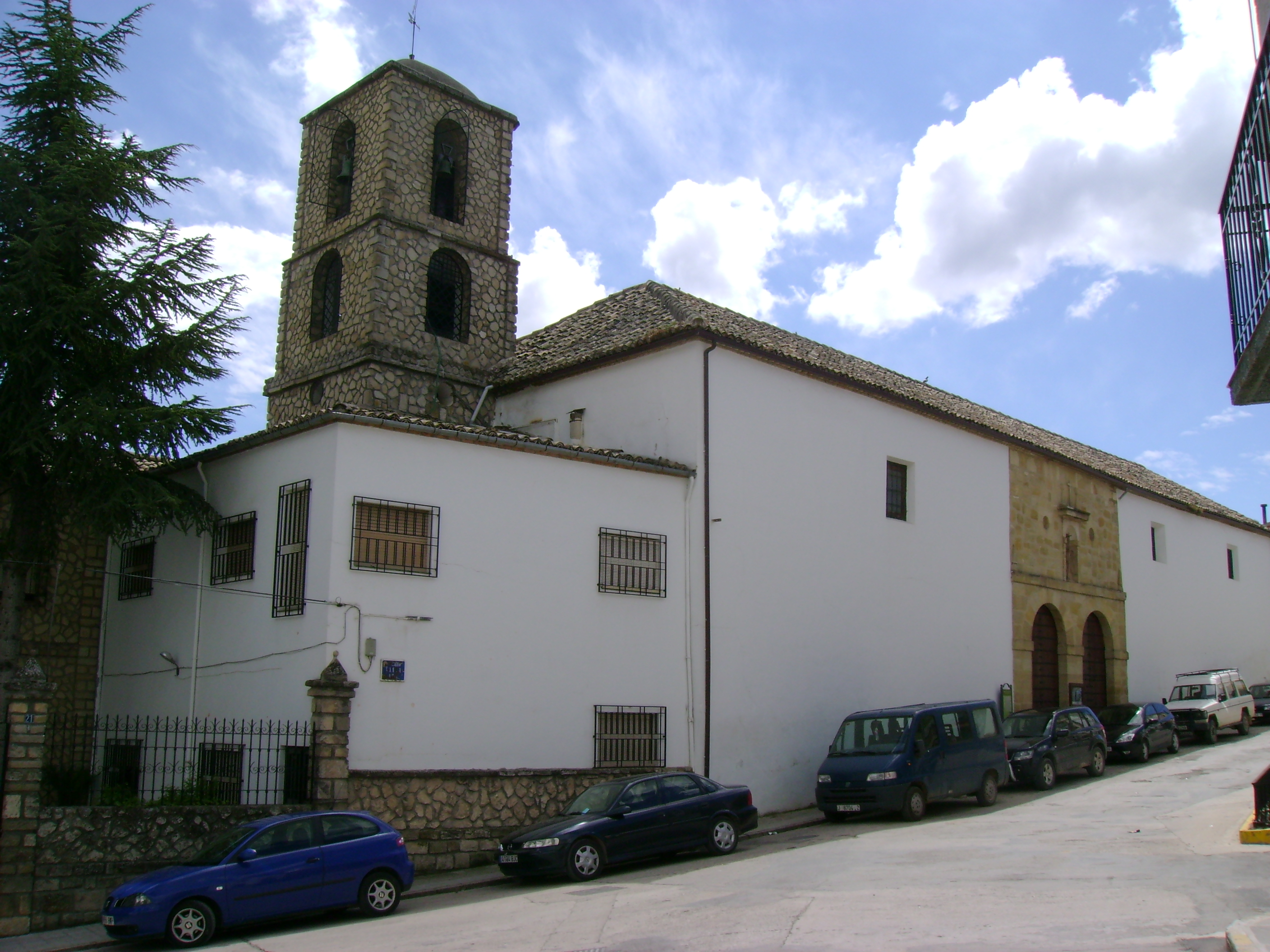 Convento de Dominicas de Santa Ana en Villanueva del Arzobispo.